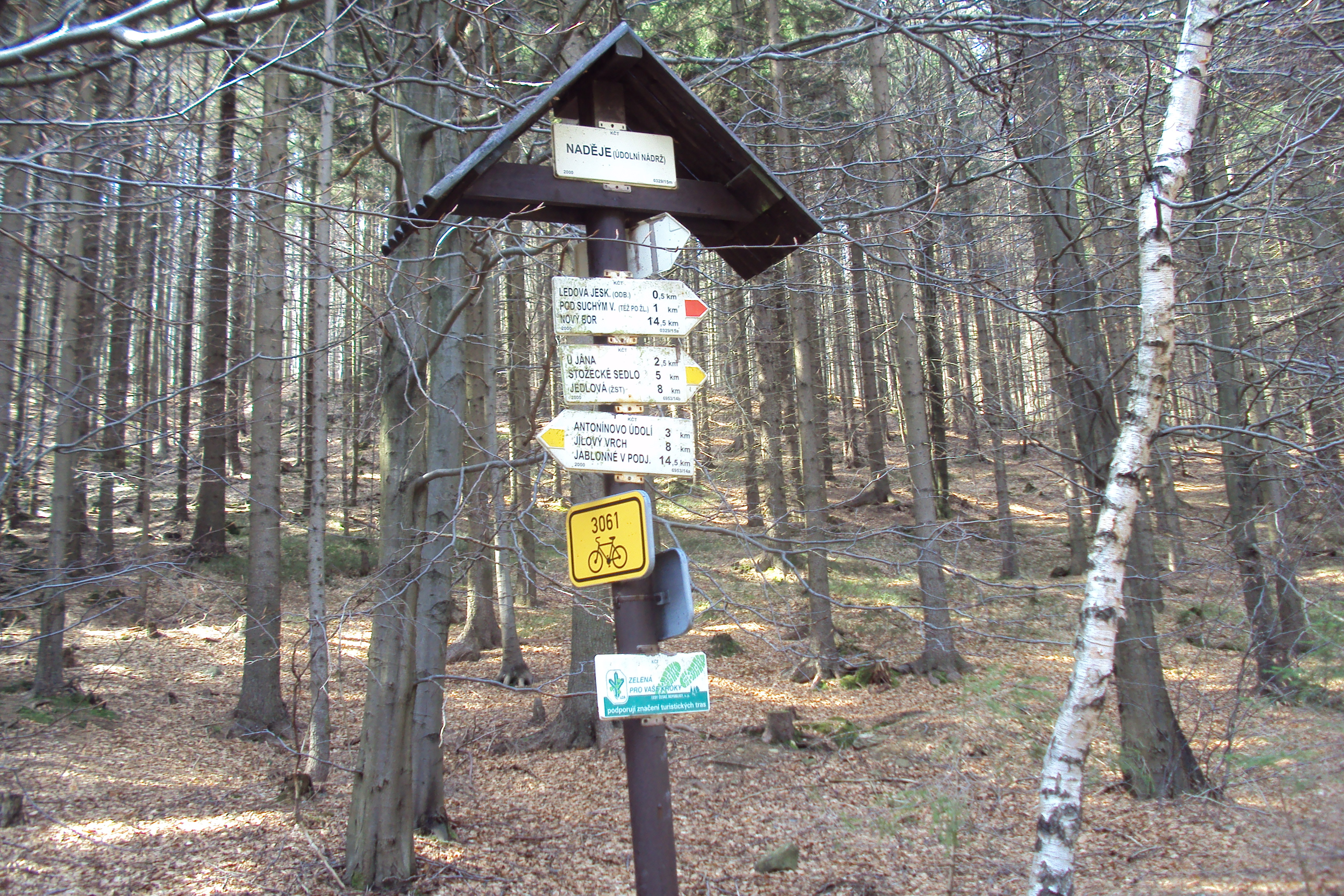 Rozcestník nedaleko jeskyně Naděje v Lužických horách